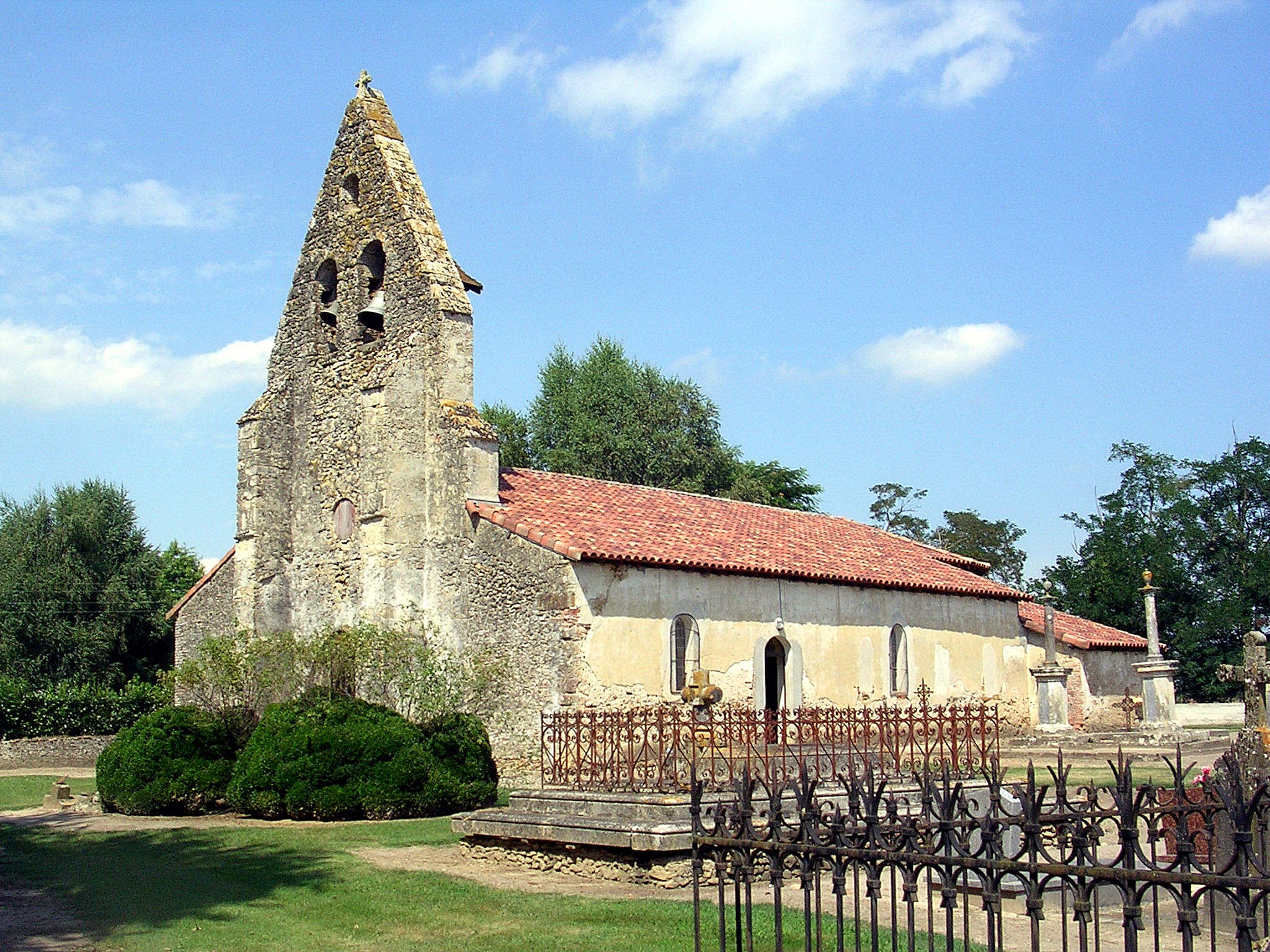 L'église de Saint-Christau à Benquet (Landes, France)